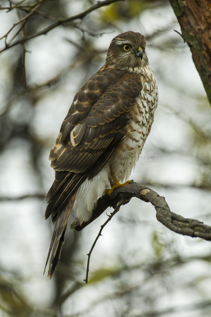 Eurasian Sparrowhawk juv - Kisjuszallas - Hungary_S4E0660